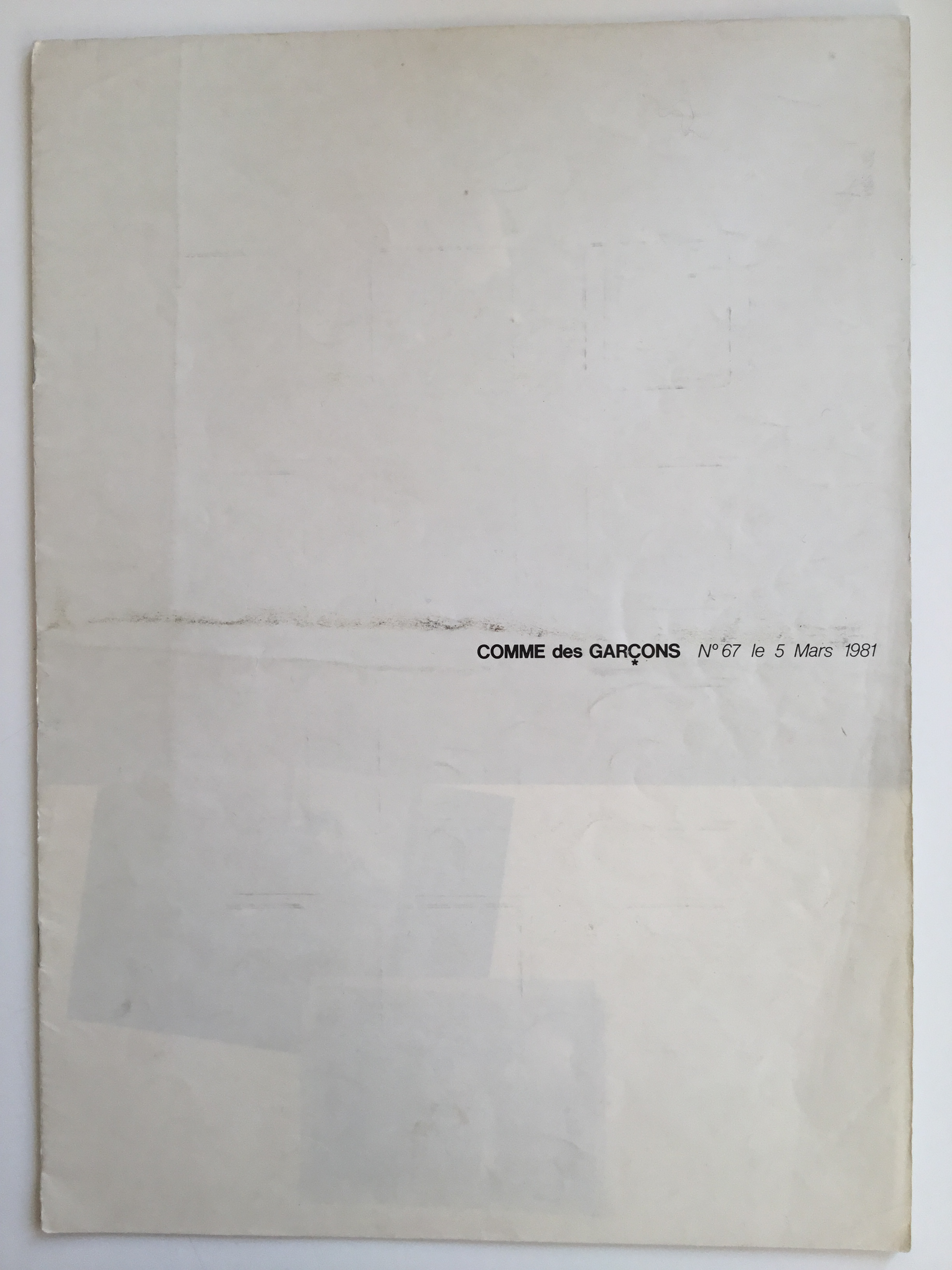 The cover of the COMME des GARÇONS catalogue no.67 le 5 Mars, 1981